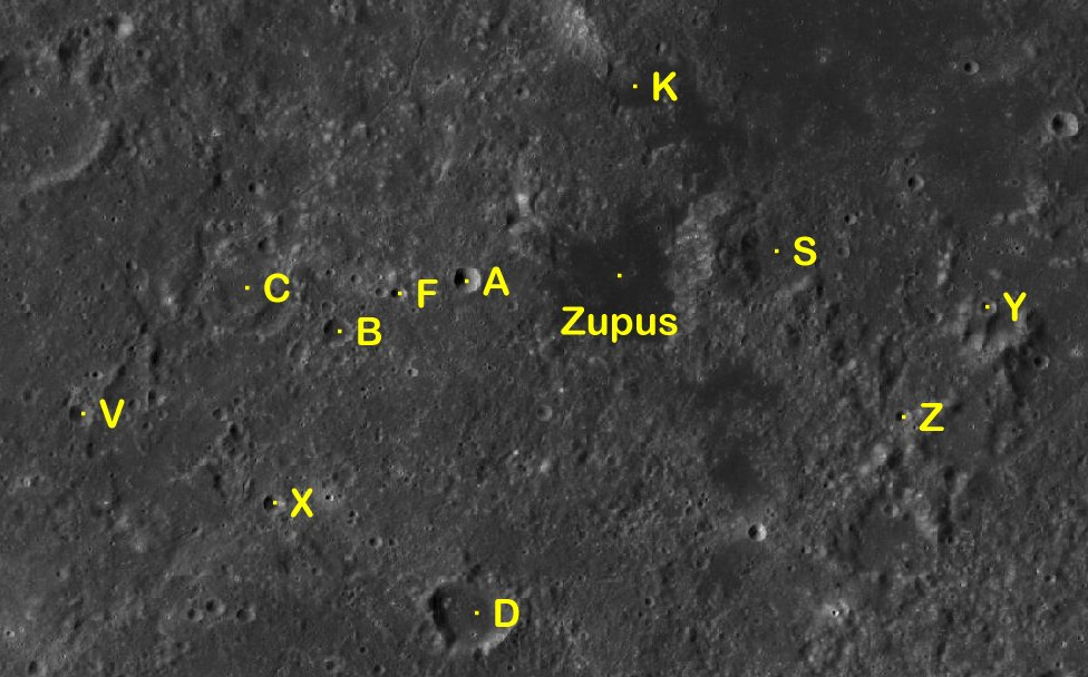 Cráter lunar Zupus. Cráteres satélite. (Imagen LRO)